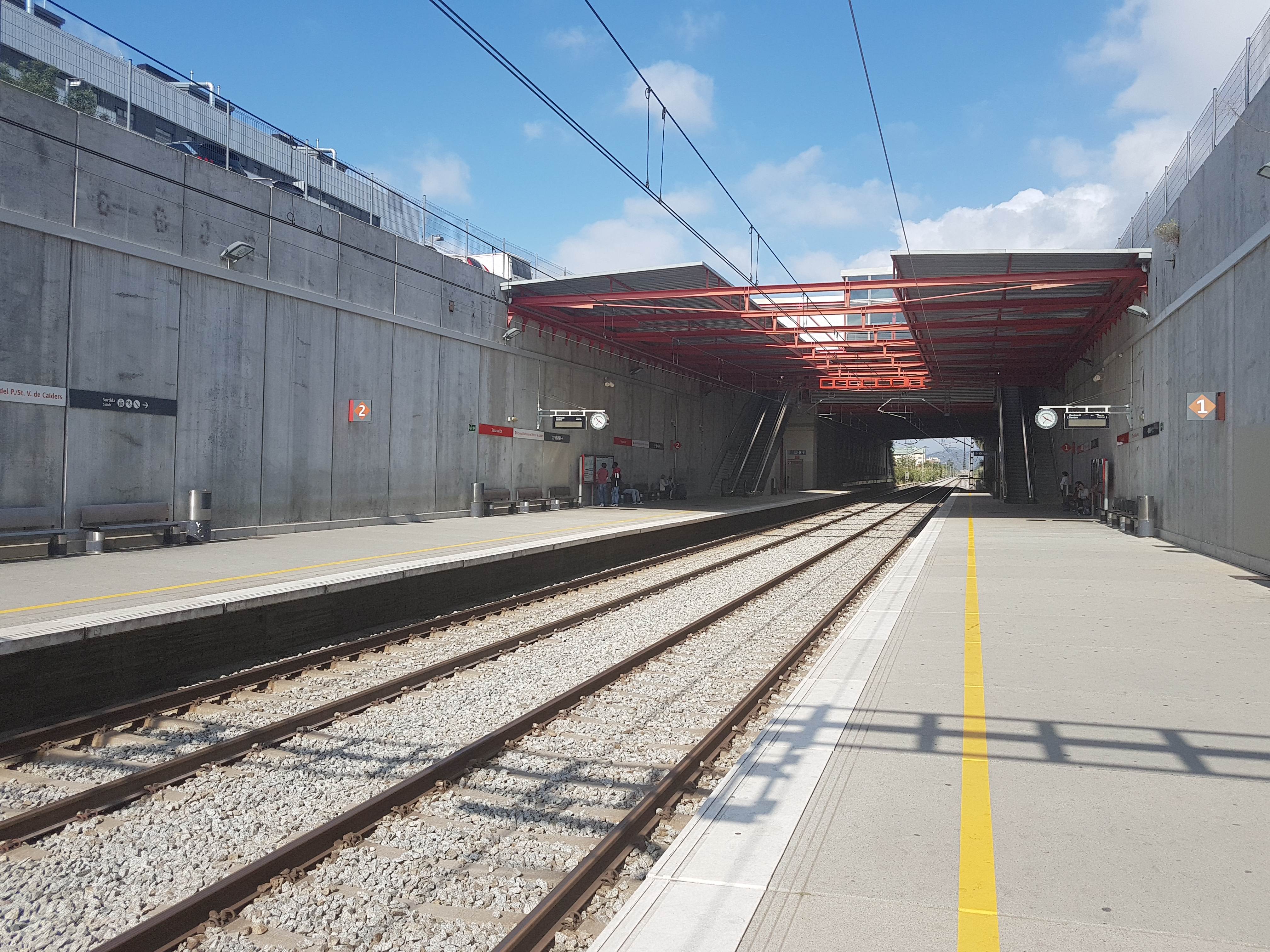 Estació de Terrassa Est de la línia Barcelona-Manresa-Lleida